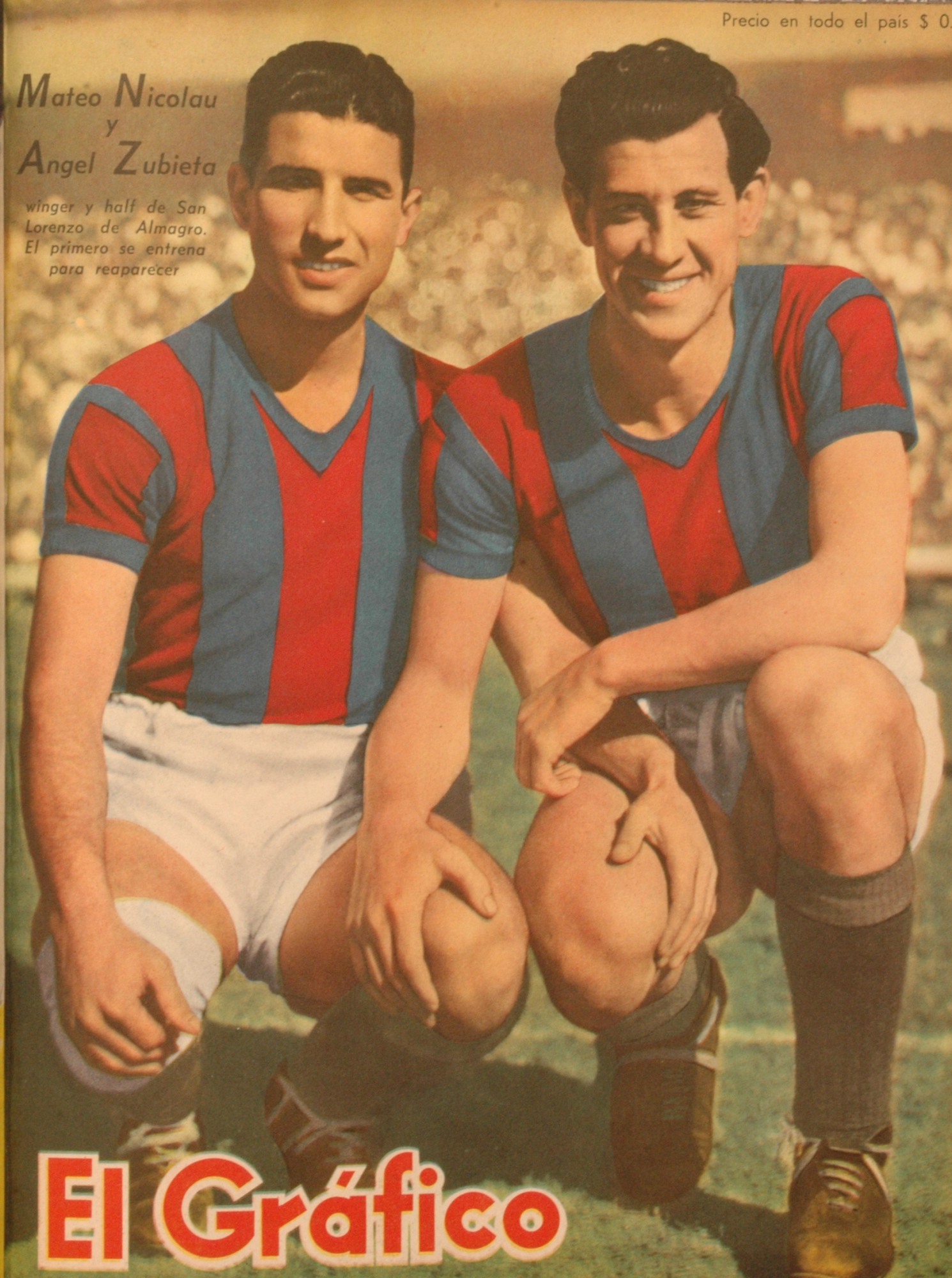 El Grafico del 08 de Mayo de 1942. Edicion 1191